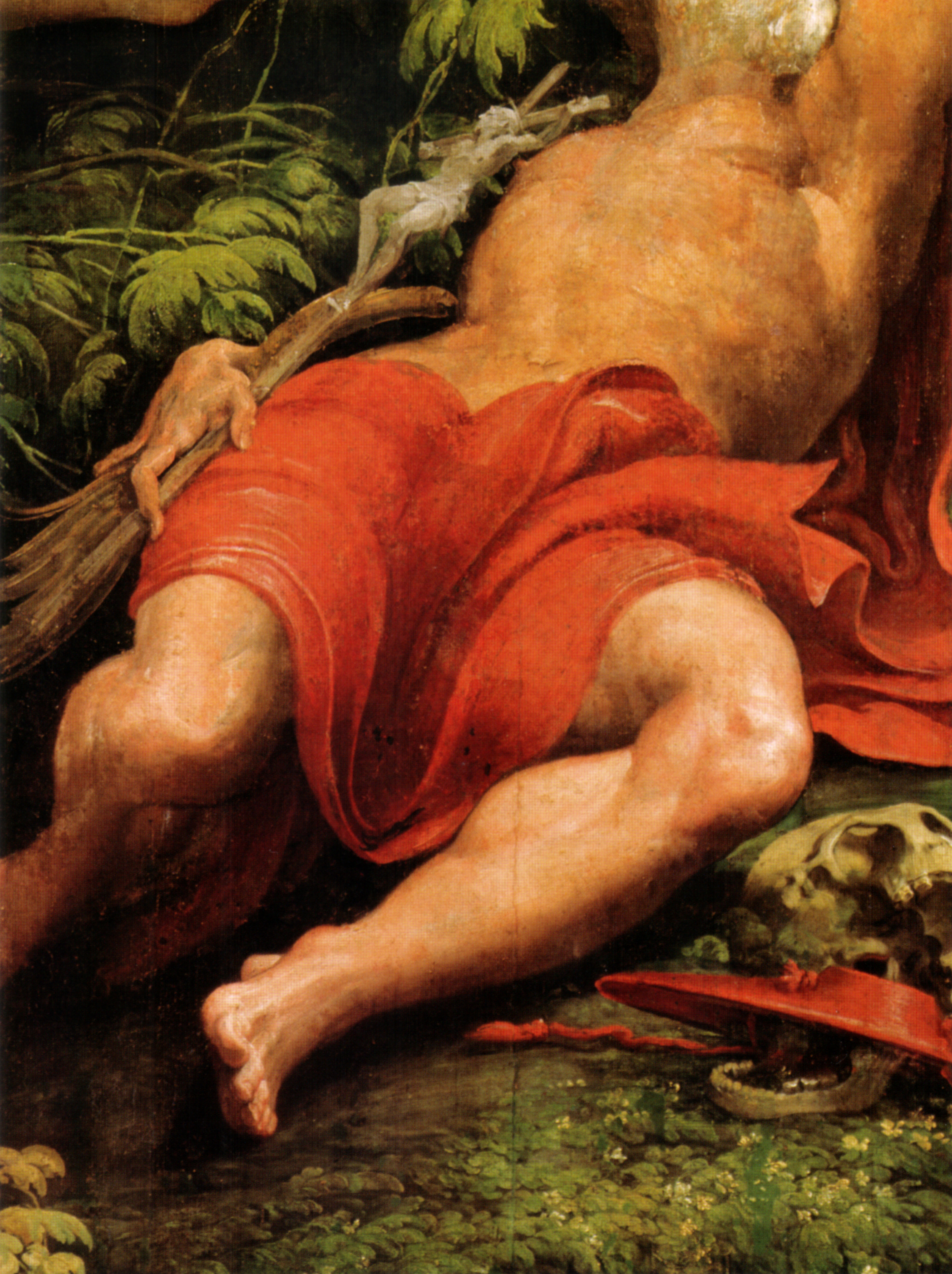 detail